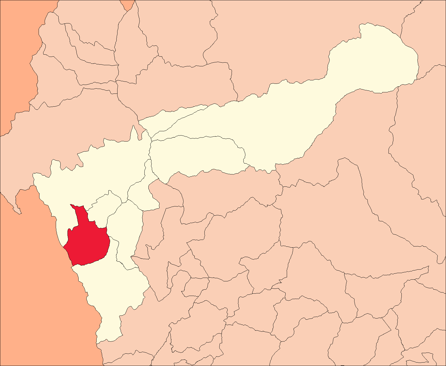 Ubicación del distrito de Ripán.